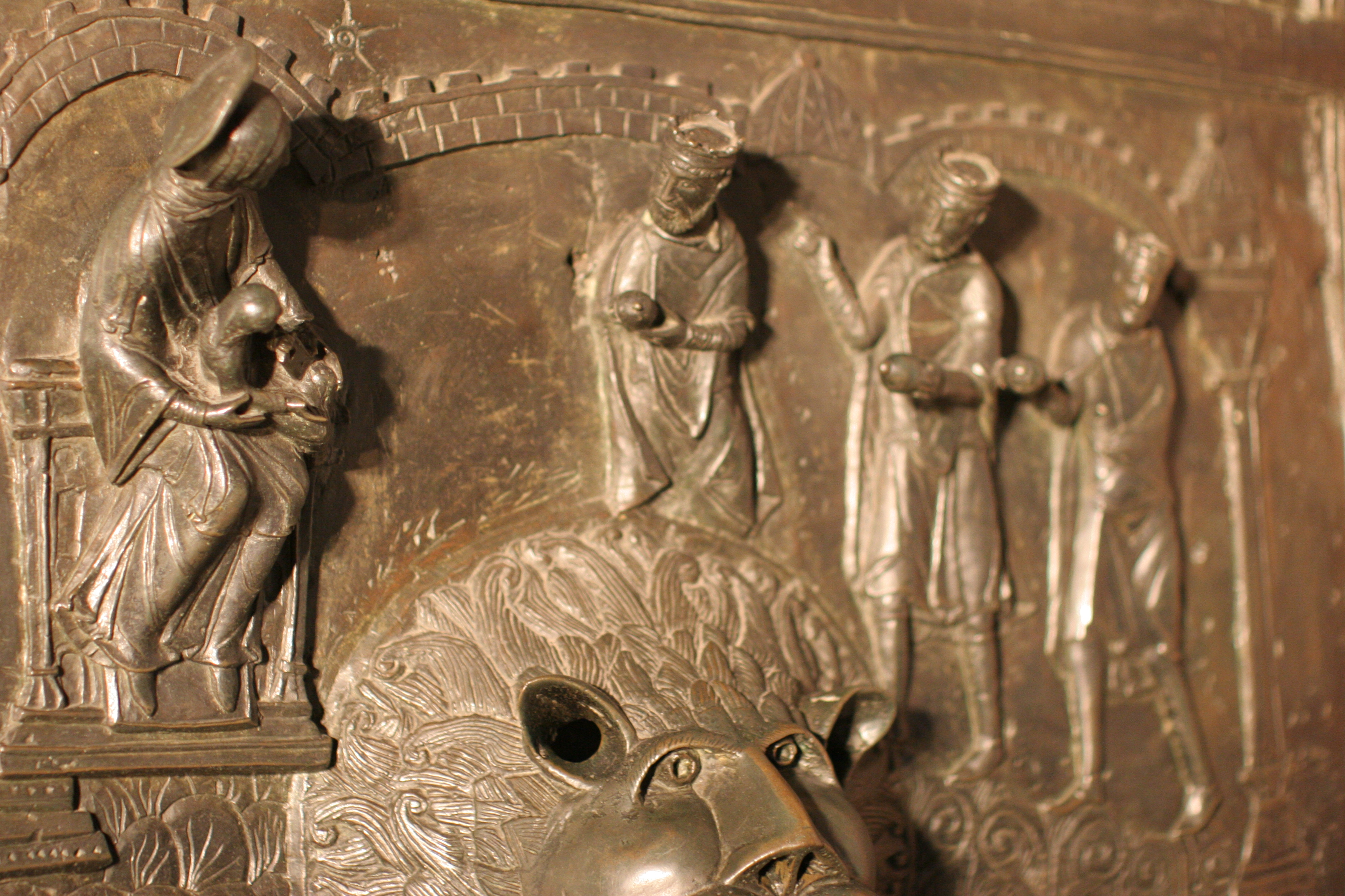 Bernwardstür im Hildesheimer Dom- Detail: Anbetung der Magier